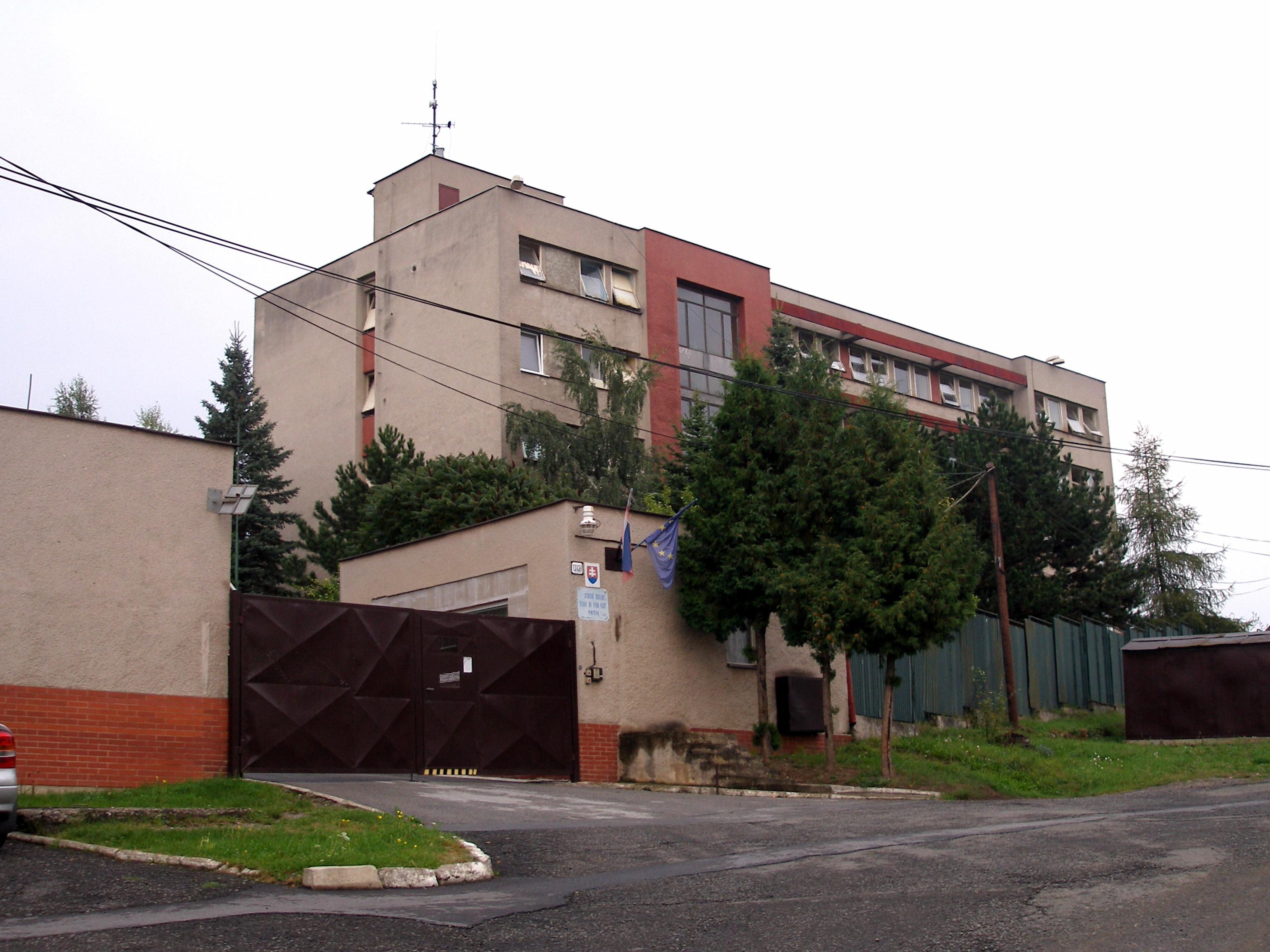 Ulica Pionierska v Prešove.